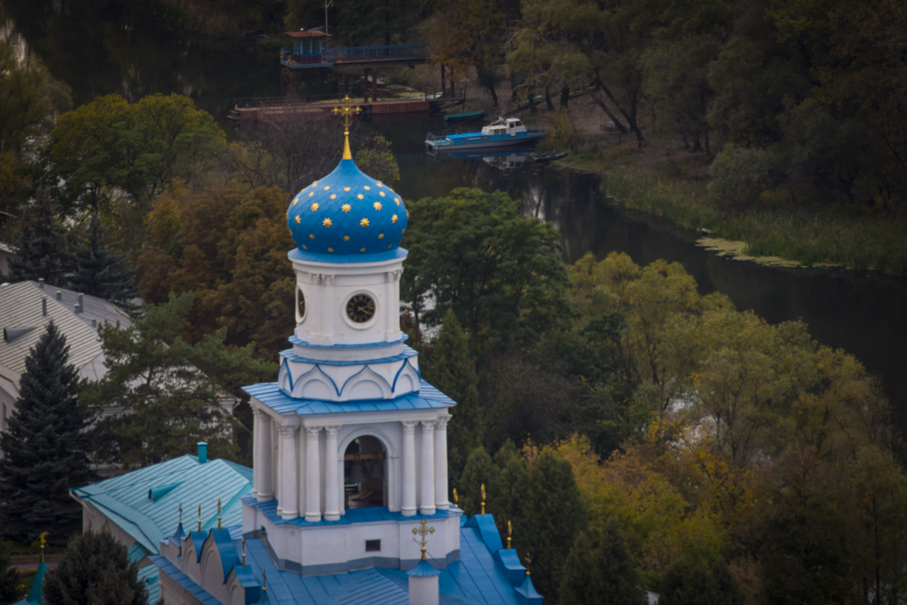 Трапезна церква з дзвіницею, Святогірськ, вул. Зарічна, 1